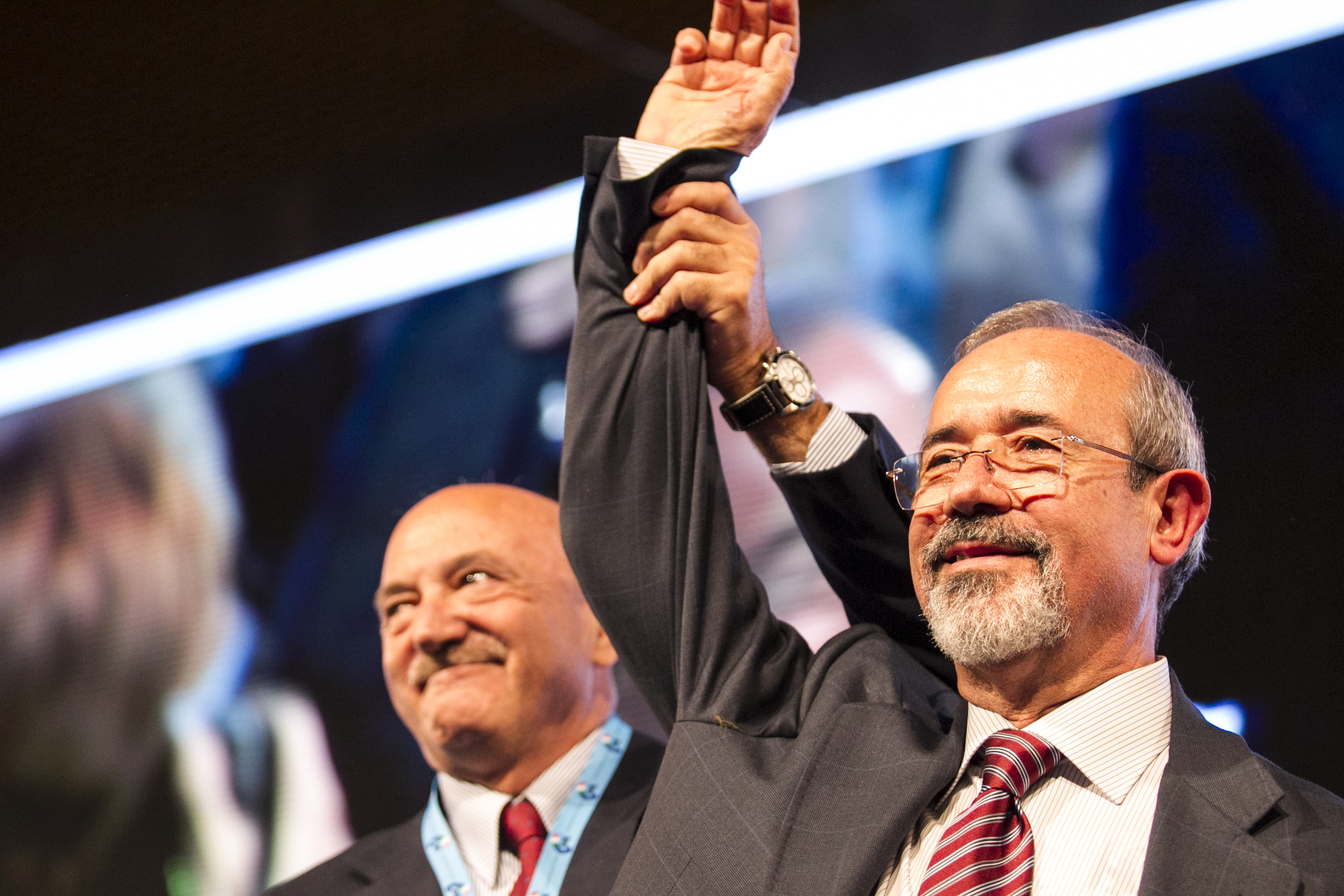 XVI Congresso UIL